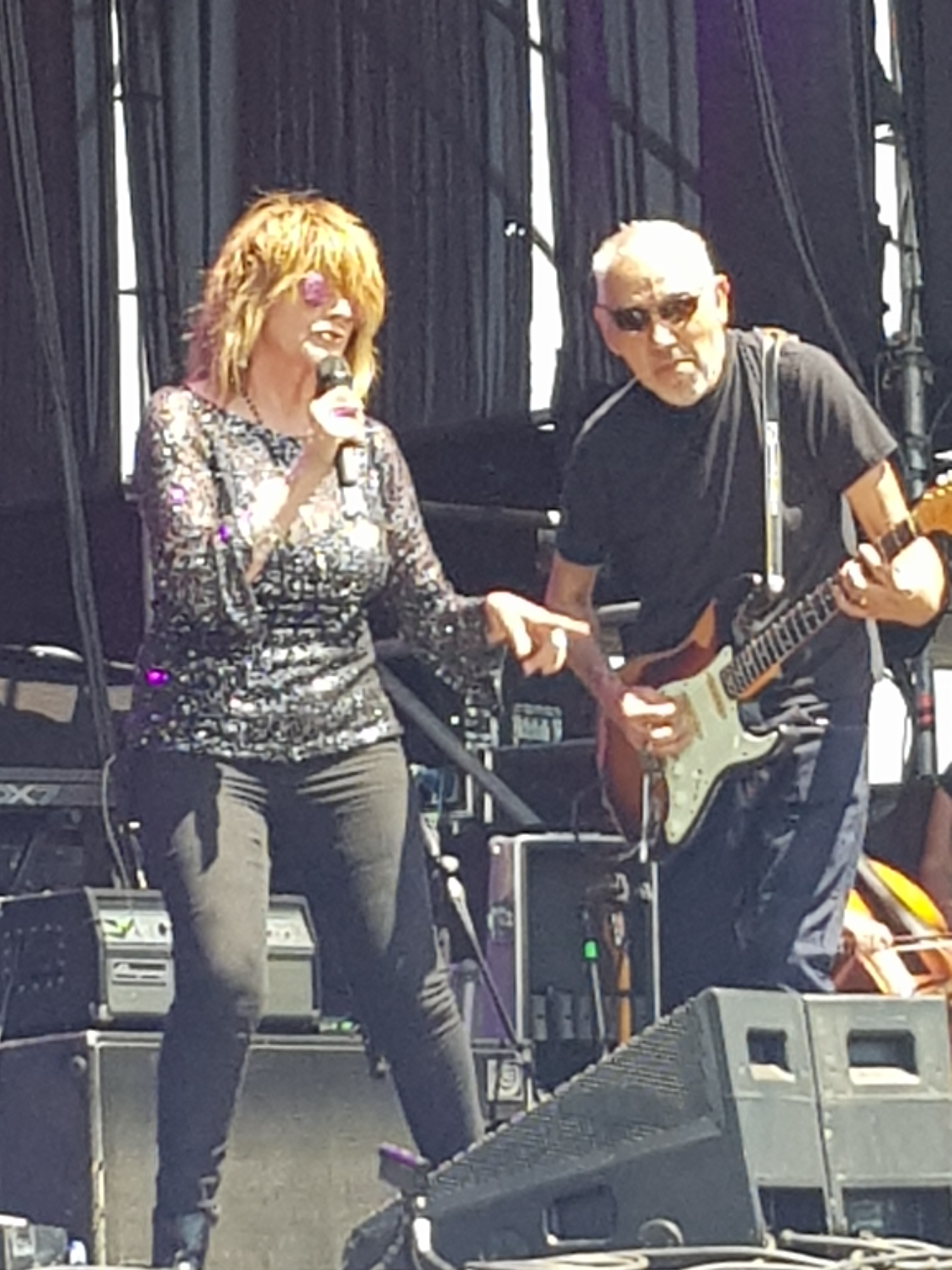 Aguaturbia, durante la Cumbre del Rock Chileno 2018, el 27/01/2018